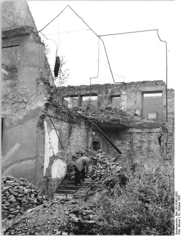 Magdeburg, Röntgenstraße, Ruine Zentralbild Biscan 10 Mot. 10.10.1955 Kriegsschäden in gemeinsamer Arbeit überwunden 800 Wohnungen mit staatlicher Hilfe wieder aufgebaut Die Heimstätten-Baugenossenschaft in Magdeburg-Westerplan hat durch anglo-amerikanische Bomben 52 % ihres gesamten Bestandes an Wohnraum verloren. Weitere 40 %wurden mehr oder wemiger stark beschädigt. 4,8 Millionen staatliche Beihilfe und 1,5 Millionen eigene Mittel versetzten die Genossenschaft in die Lage, 800 ( acht null null) der zerstörten und beschädigten Wohnungen wieder instandzusetzen und 450 -vier fünf null) Wohnungen neu zu bauen. Dank der unermüdlichen Aufbauarberi der Genossenschafter und der Kollegen des Patenbetriebes, des Schwermaschinenbaues "Ernst Thälmann", konnte besonders wirtschaftlich gearbeitet und große Summen eingespart werden. Das Finanzministerium und die Deutsche Investionsbank haben das geprüft und der Genossenschaft ihre Anerkennung ausgesprochen. UBz: So sah es nahezu in allen Strassen der Siedlung WESTERNPLAN aus: Eine Ruine reihte sich an die andere, wie hier in der Röntgenstrasse.